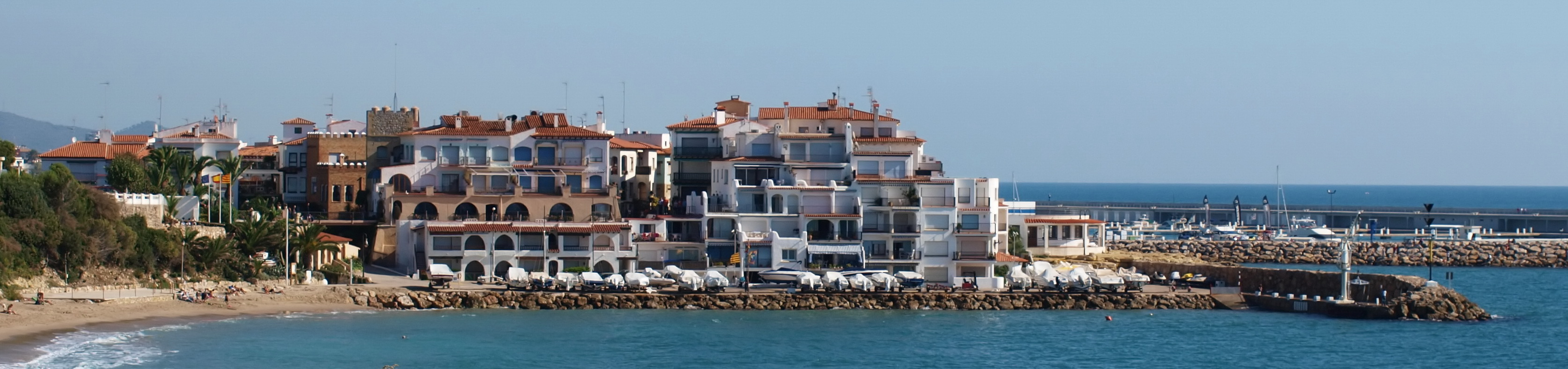 El Roc de Sant Gaietà en el municipio de Roda de Barà, Tarragona, España